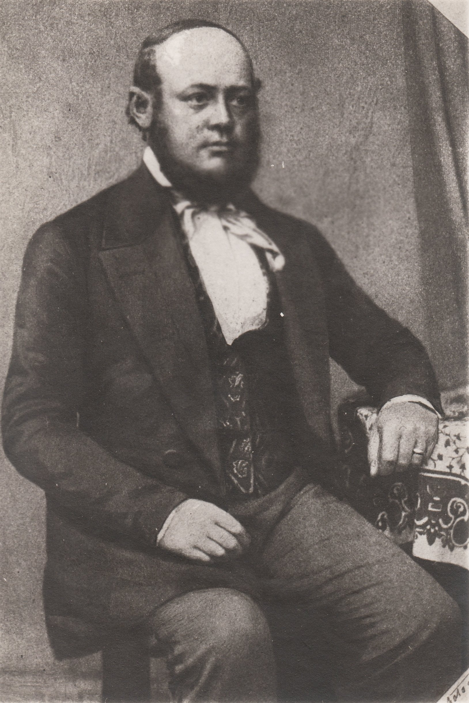 Format: Fotopositiv Dato / Date: Ukjent (før 1885) Fotograf / Photographer: Ukjent Sted / Place: Trondheim Digitalarkivet: Einar Grams husstand (Folketellingen 1875) Eier / Owner Institution: Trondheim byarkiv, The Municipal Archives of Trondheim Arkivreferanse / Archive reference: Tor.H40.B12.F0682 [T0758] I 1875 finner vi huseier og bankdirektør Einar Gram (f. 1817) boende i Ilevollen 3 sammen med sin hustru Dorthea Gram (f. 1822). Samme sted bodde også hans ugifte sønn, handelskontorist Hans Gram (f. 1852) og hans svigerdatter Anna Gram (f. 1850) som da var enke. Hun hadde barna Einar Gram (f. 1872) og Jajette Gram (f. 1875) boende med seg.